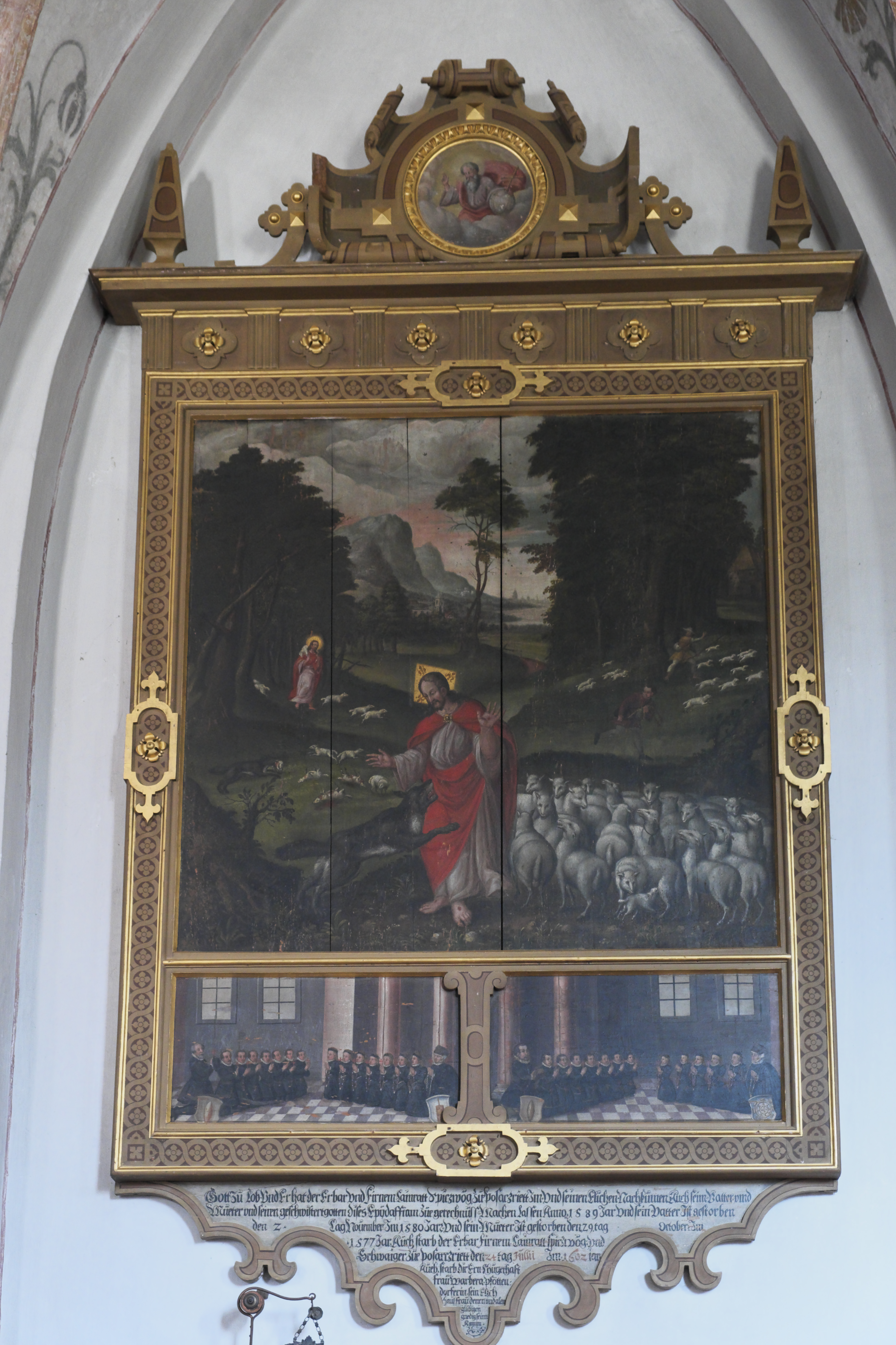 Alte katholische Pfarrkirche St. Nikolaus in Neuried (bei München) im Landkreis München (Bayern, Deutschland), Epitaph